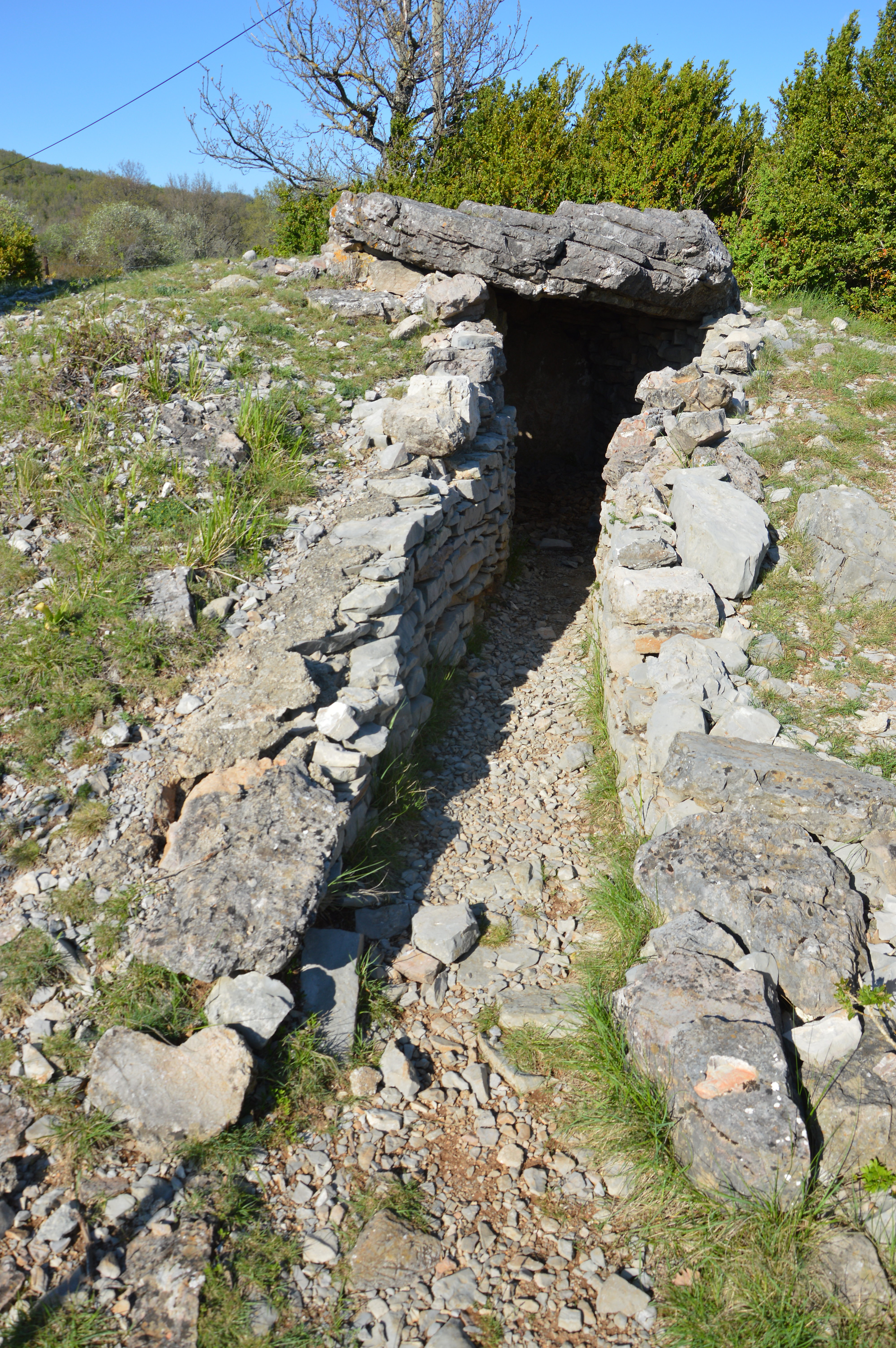 Dolmen du Planas sur le causse de Blandas